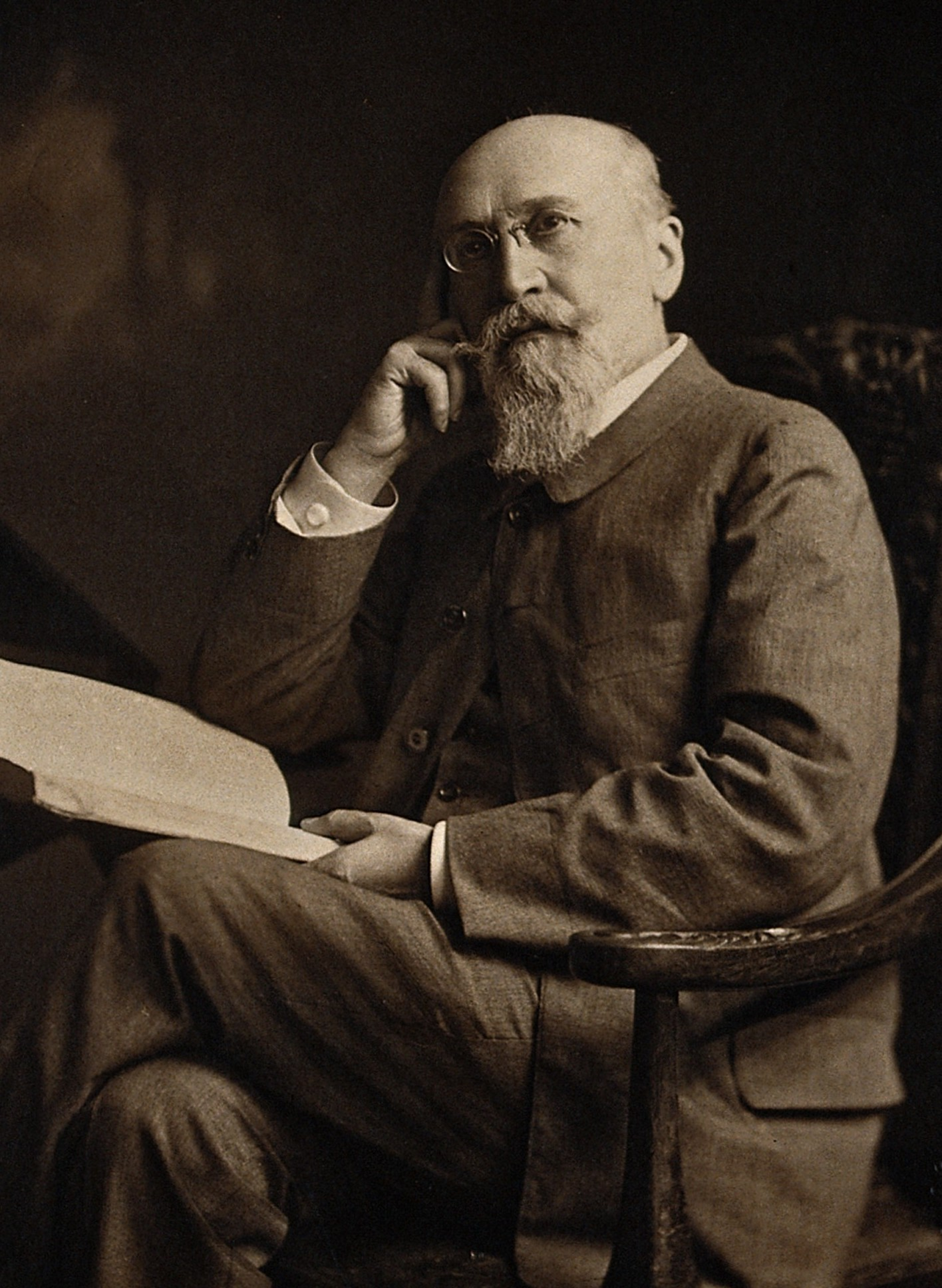 Emile Gley